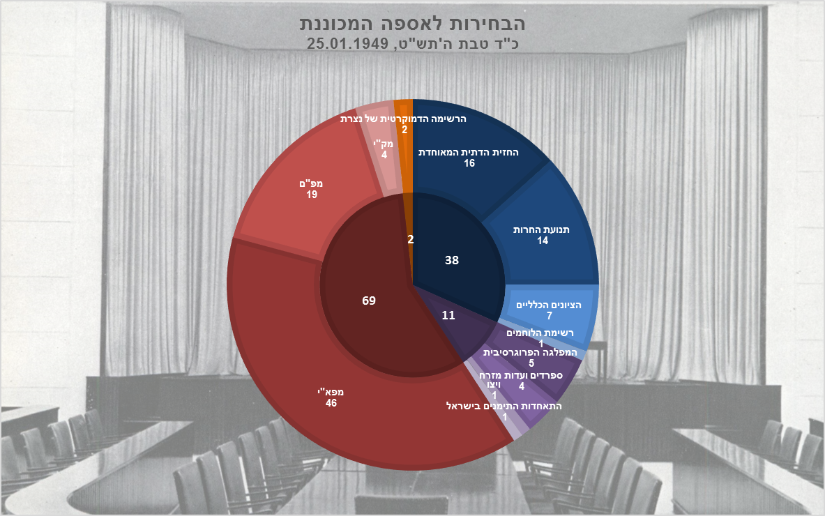 תוצאות הבחירות לאספה המכוננת, היא הכנסת הראשונה